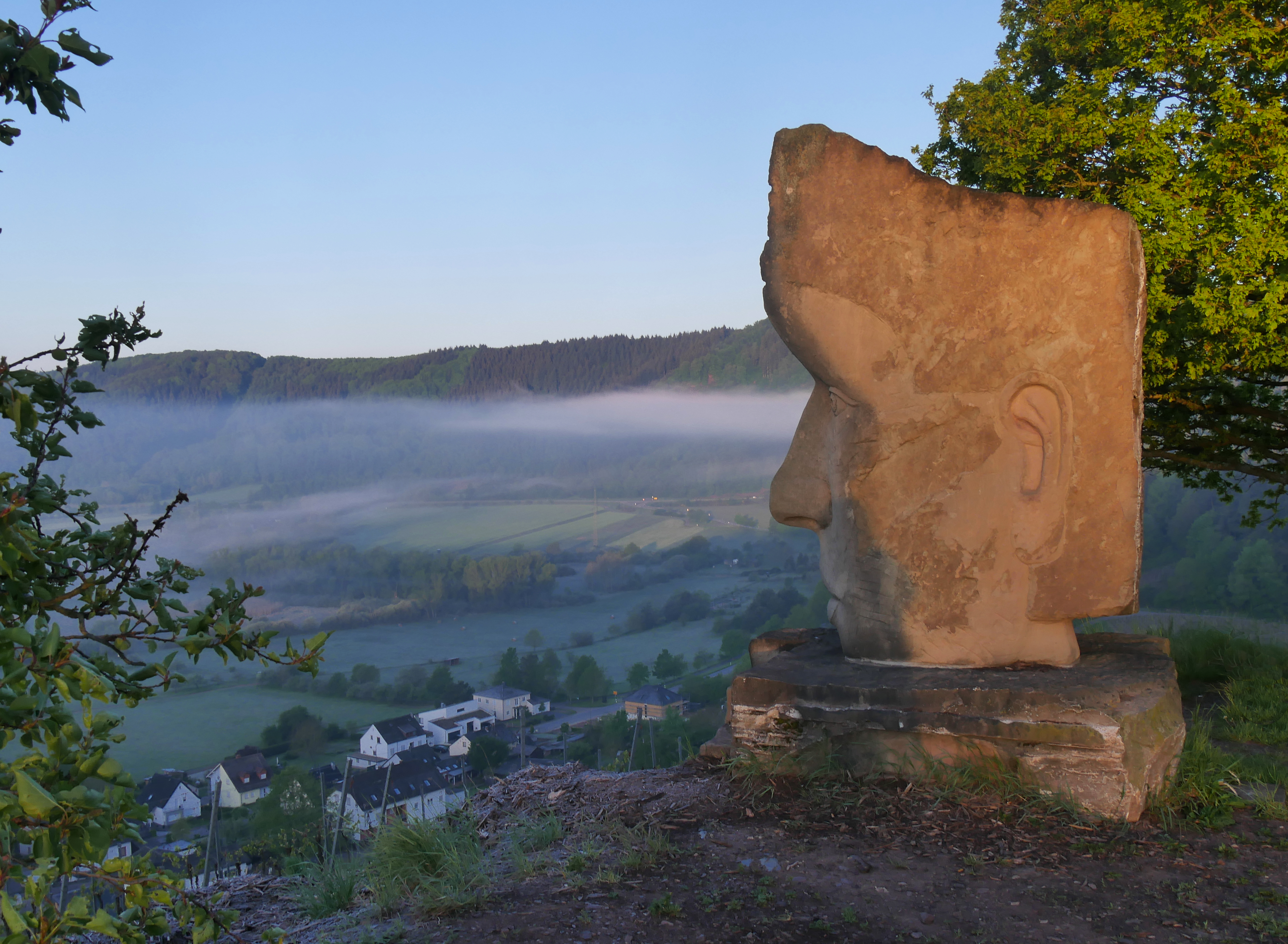 Skulptur Meteor von Jürgen Waxweiler auf dem "Goldberg" nördlich von Wawern. Meteore griechisch für "schwebend in der Luft" sind im weiteren Sinne lokale, sporadische Leuchterscheinungen am Himmel und an der Erdoberfläche.... Entstanden im Rahmen des Bildhauersymposiums 2007 in Konz.